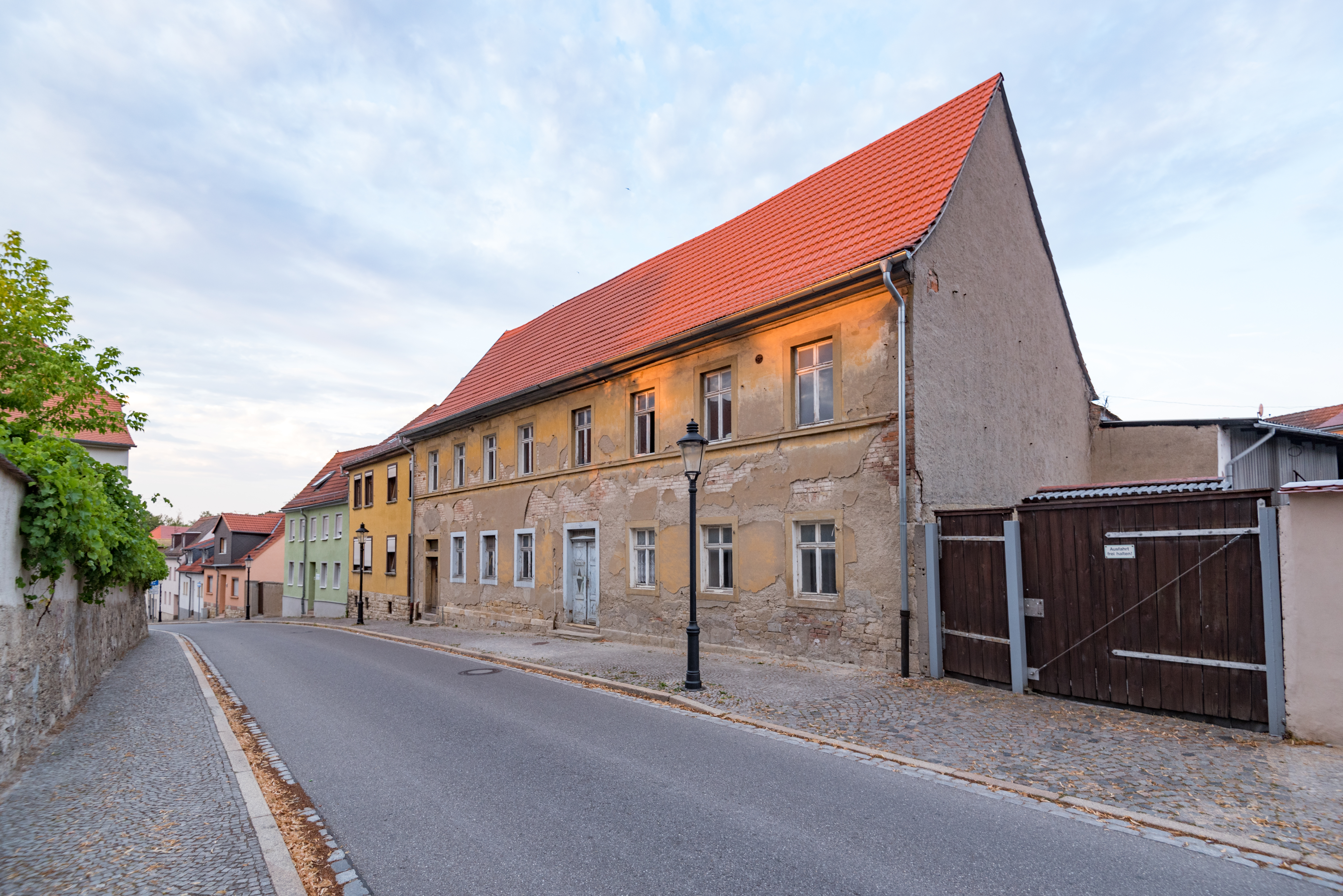 Naumburg (Saale), Moritzberg 1, 1a